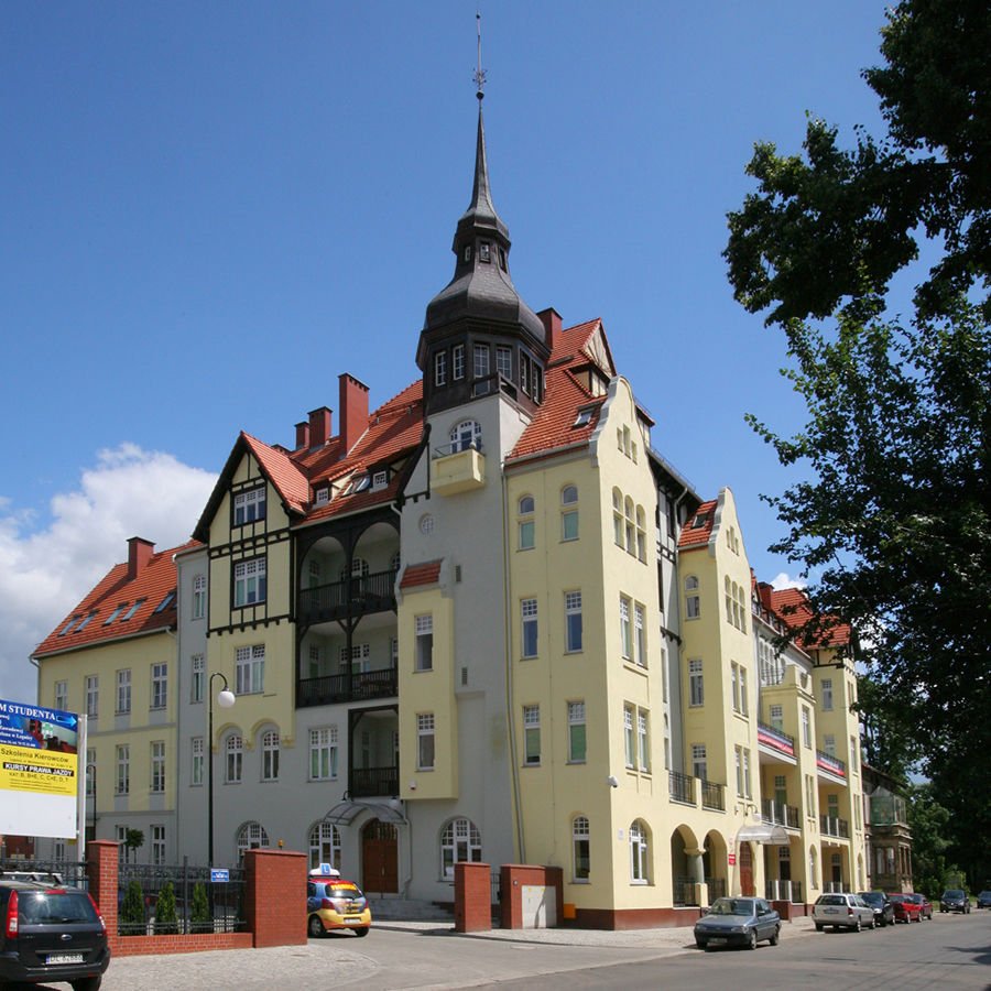 Legnica, ul. Mickiewicza 10 - akademik "PWSZ w Legnicy"